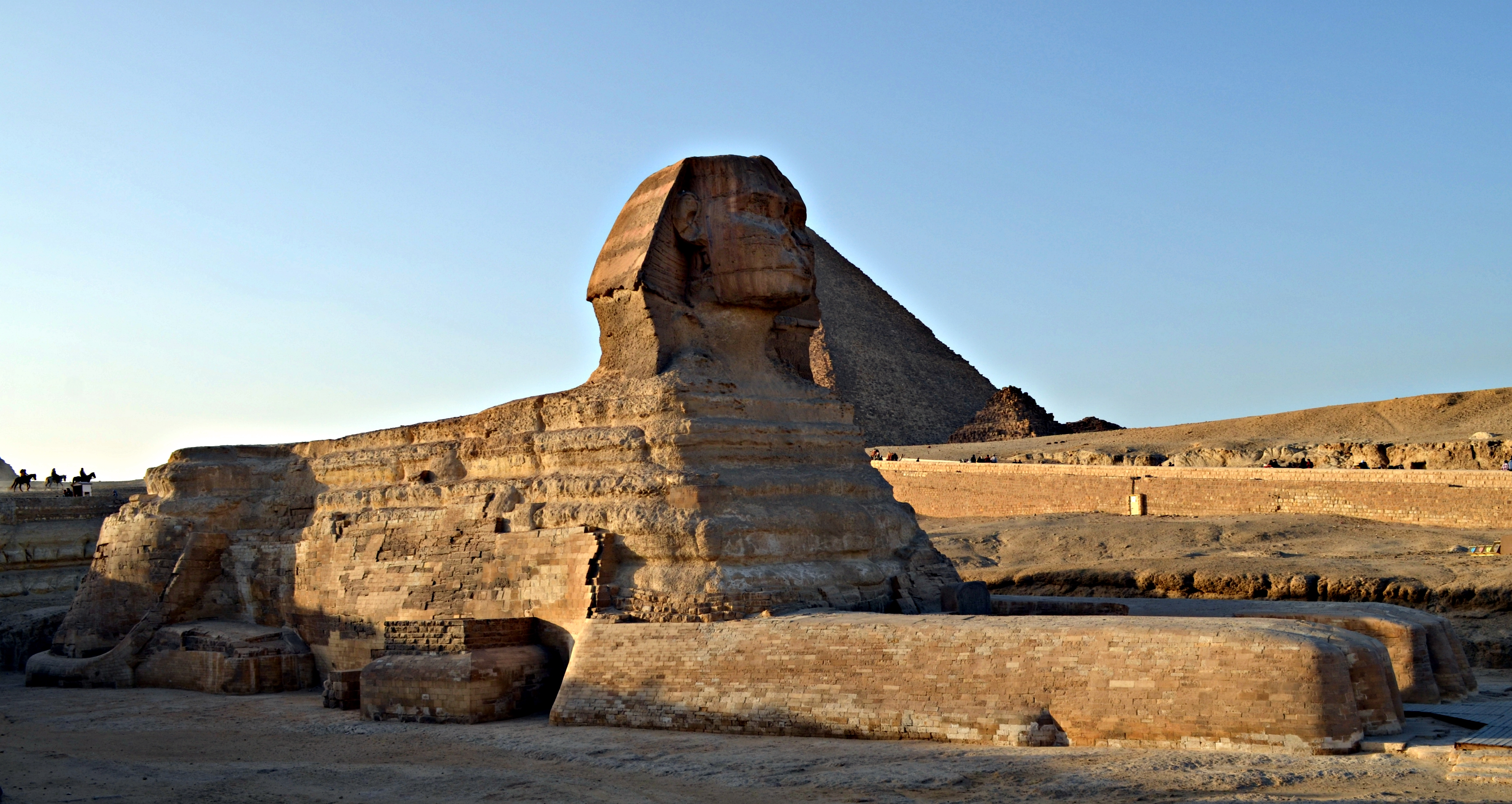 أبو الهول، الجيزة.